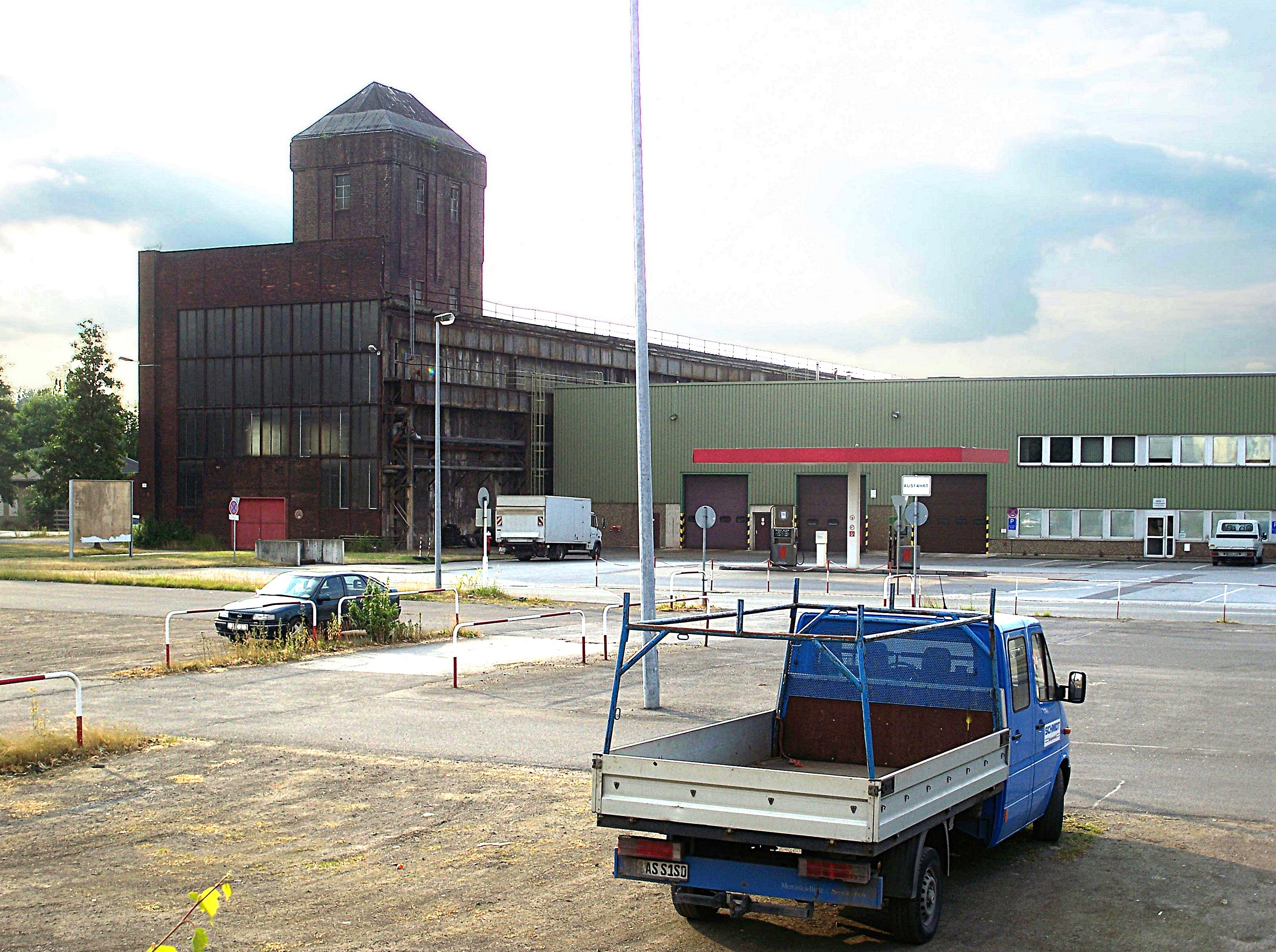 Noch stehender Turm auf dem Gelände des ehemaligen Bochumer Vereins an der Essener Straße in Höntrop, der den Pressluftakkumulator beherbergt. In dem Hallensegment rechts neben dem Turm stehen die zugehörigen Kompressoren, rechts schloss sich das Röhrenwalzwerk an (jetzt: Halle mit dem Schriftzug "Panopa"). Links neben dem Turm stand ursprünglich ein Mannschaftsgebäude, weiter links das Siemens-Martin Stahlwerk des Höntroper Standortes.